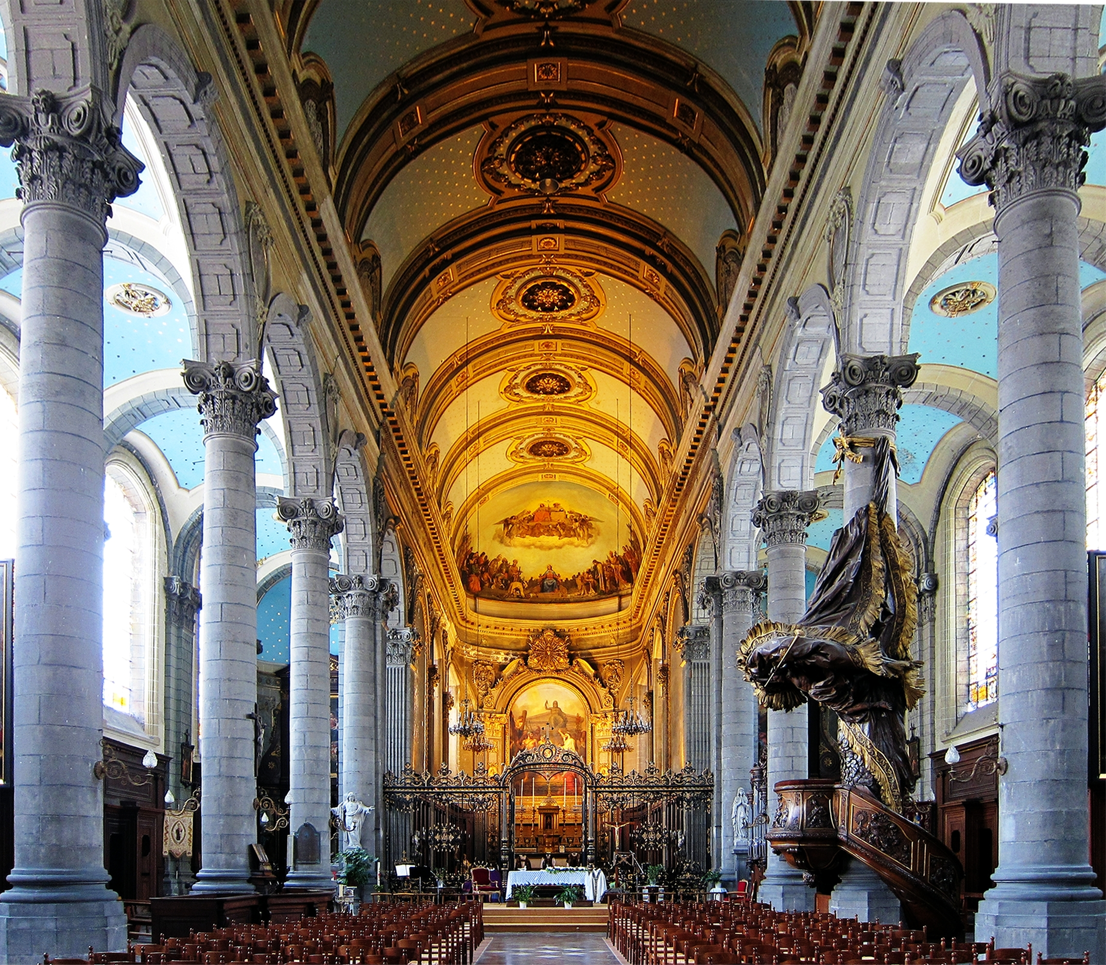 La nef de l'Église Saint-André de Lille (Nord). .